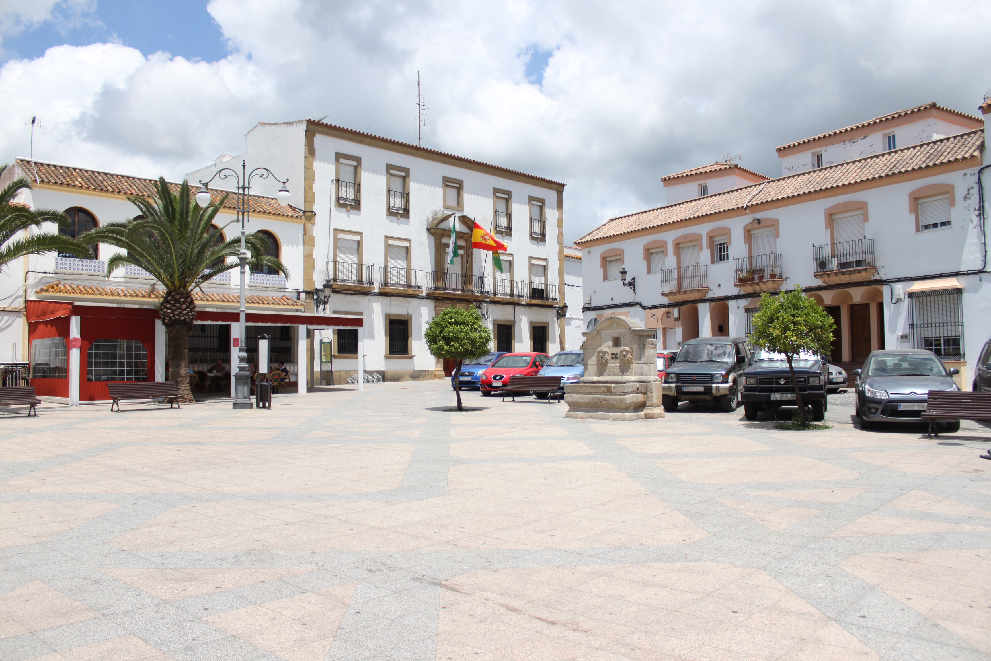 Plaza de la Iglesia, Los Barrios, Andalucía, España